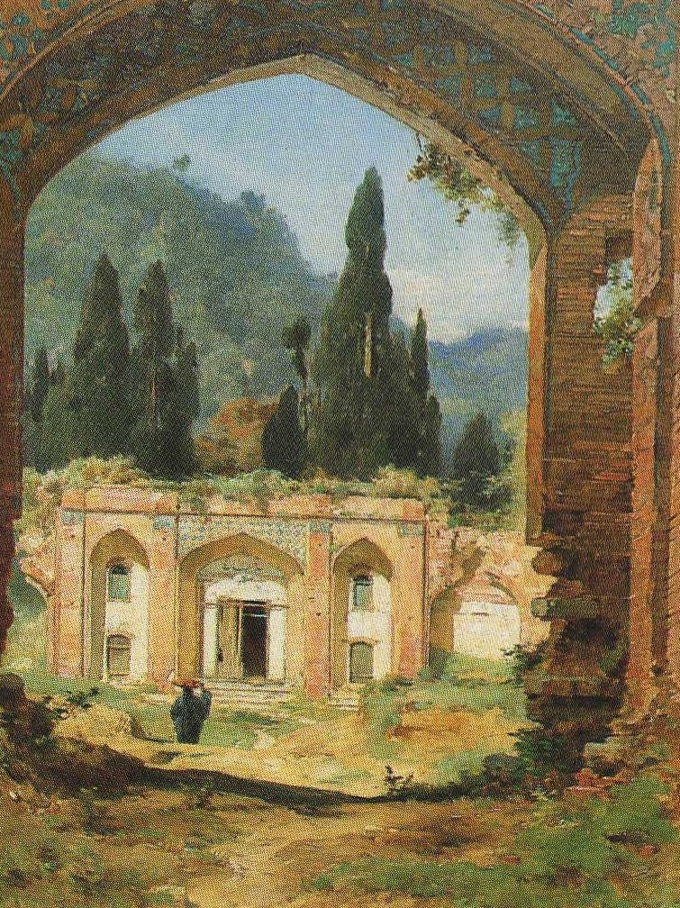 Ruine du palais d'Ashraf en Perse / huile sur toile / 65x55 cm / Carpentras, Musée Comtadin-Duplessis [inv. 320]